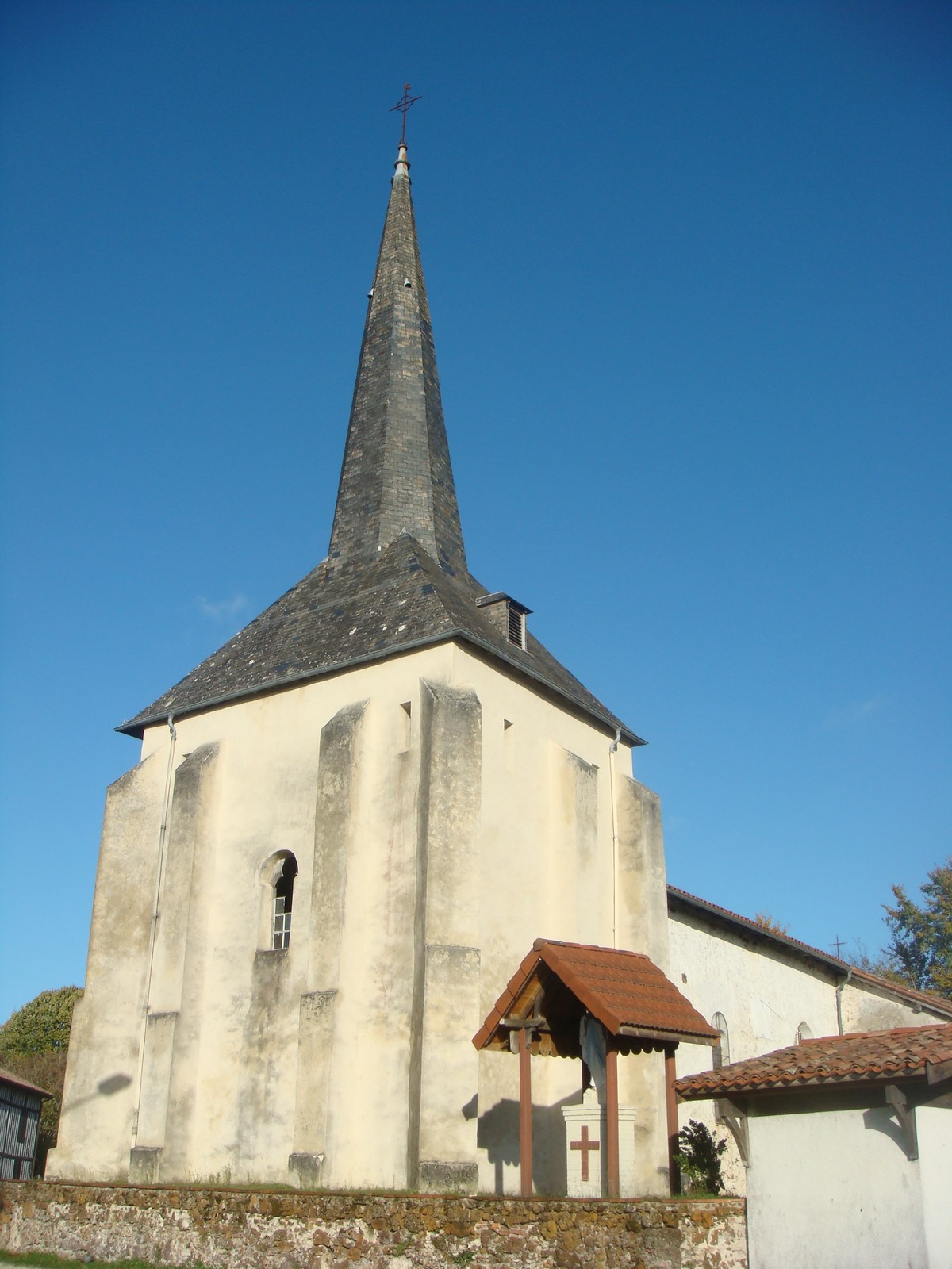 L’église Saint-Martin de Lévignacq est l'une des plus anciennes de la côte landaise.